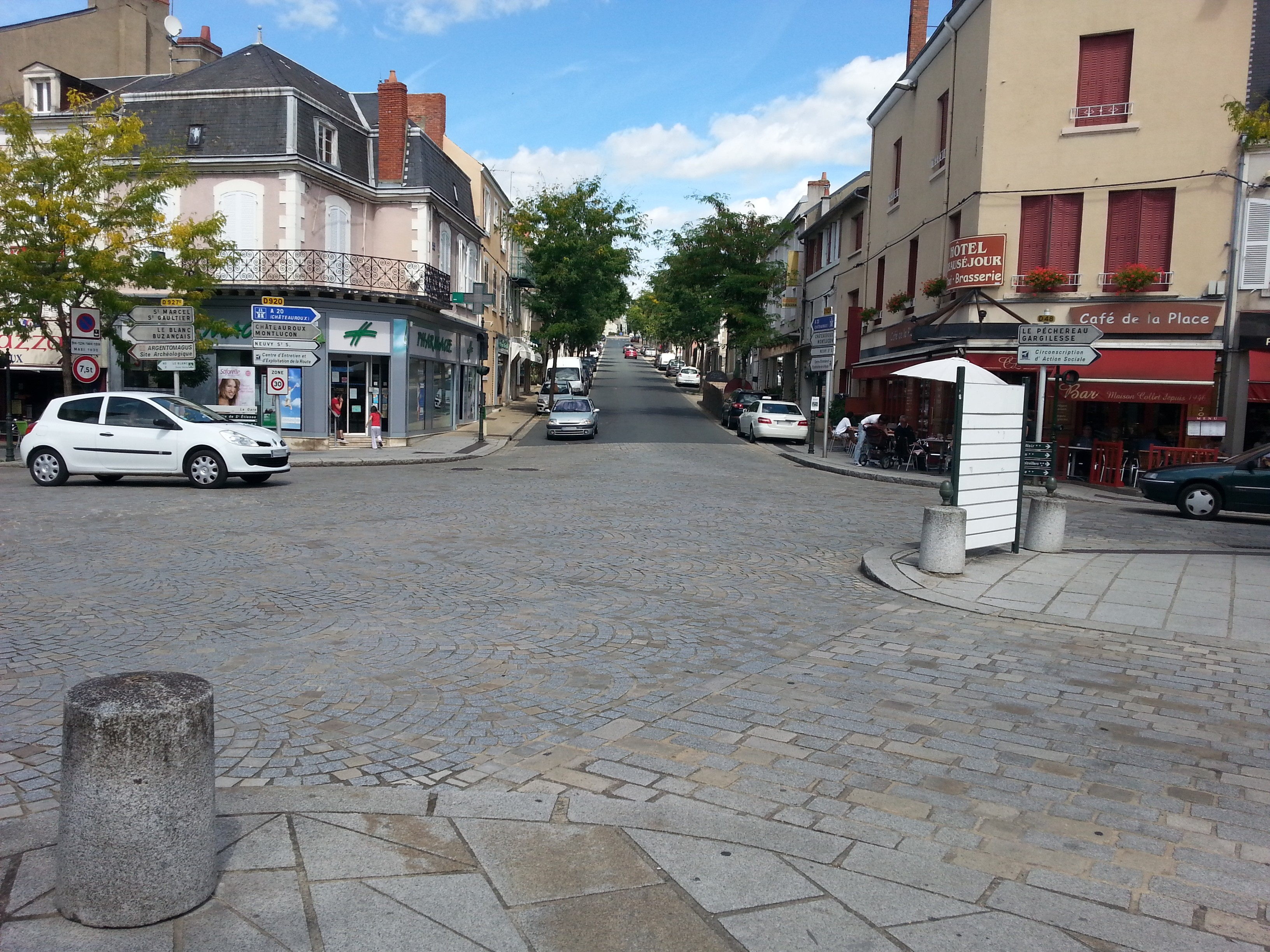 Argenton-sur-Creuse (36) : La rue Ledru Rollin (route départementale 920).